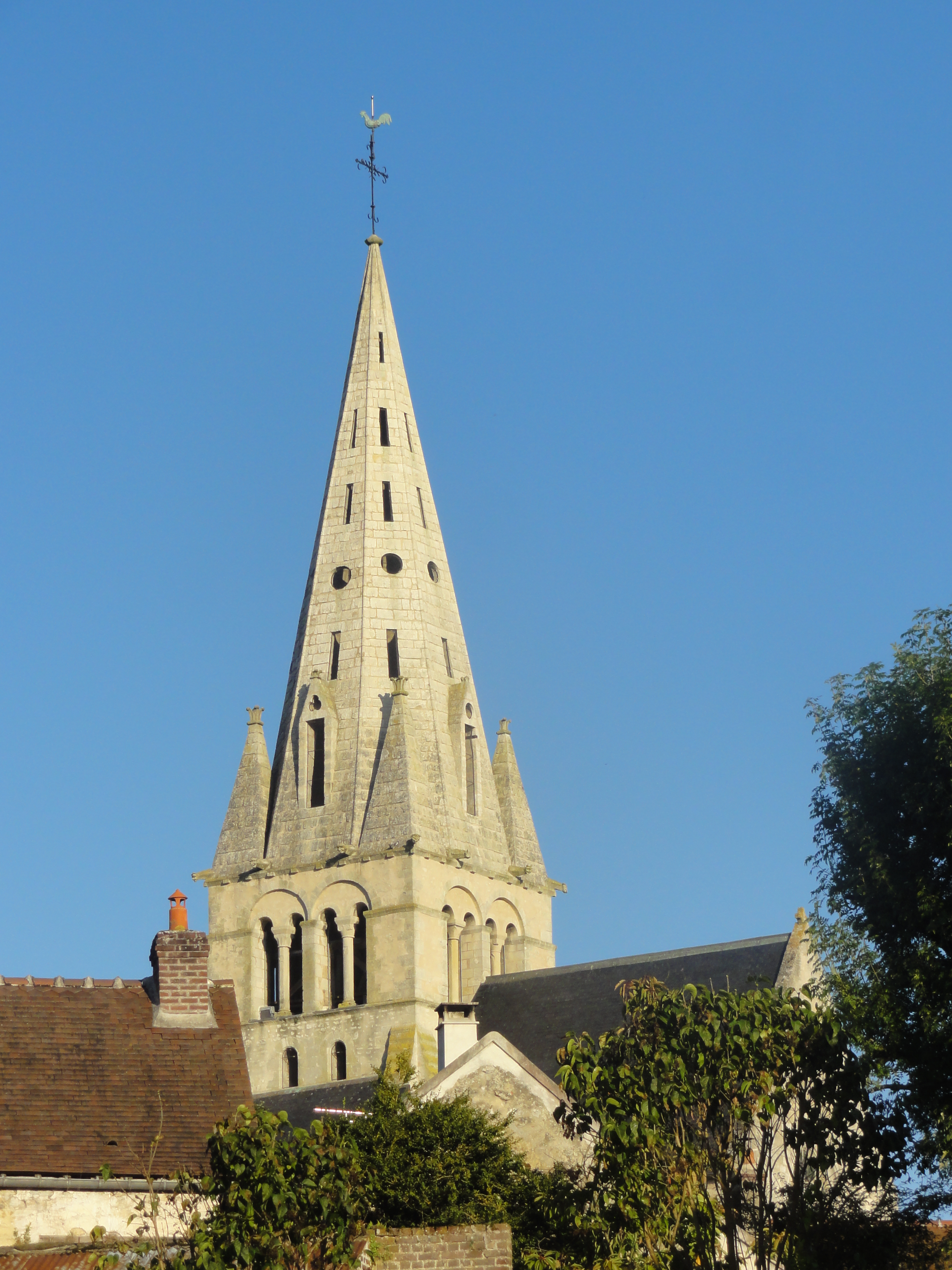 Clocher, vue depuis le sud-est.